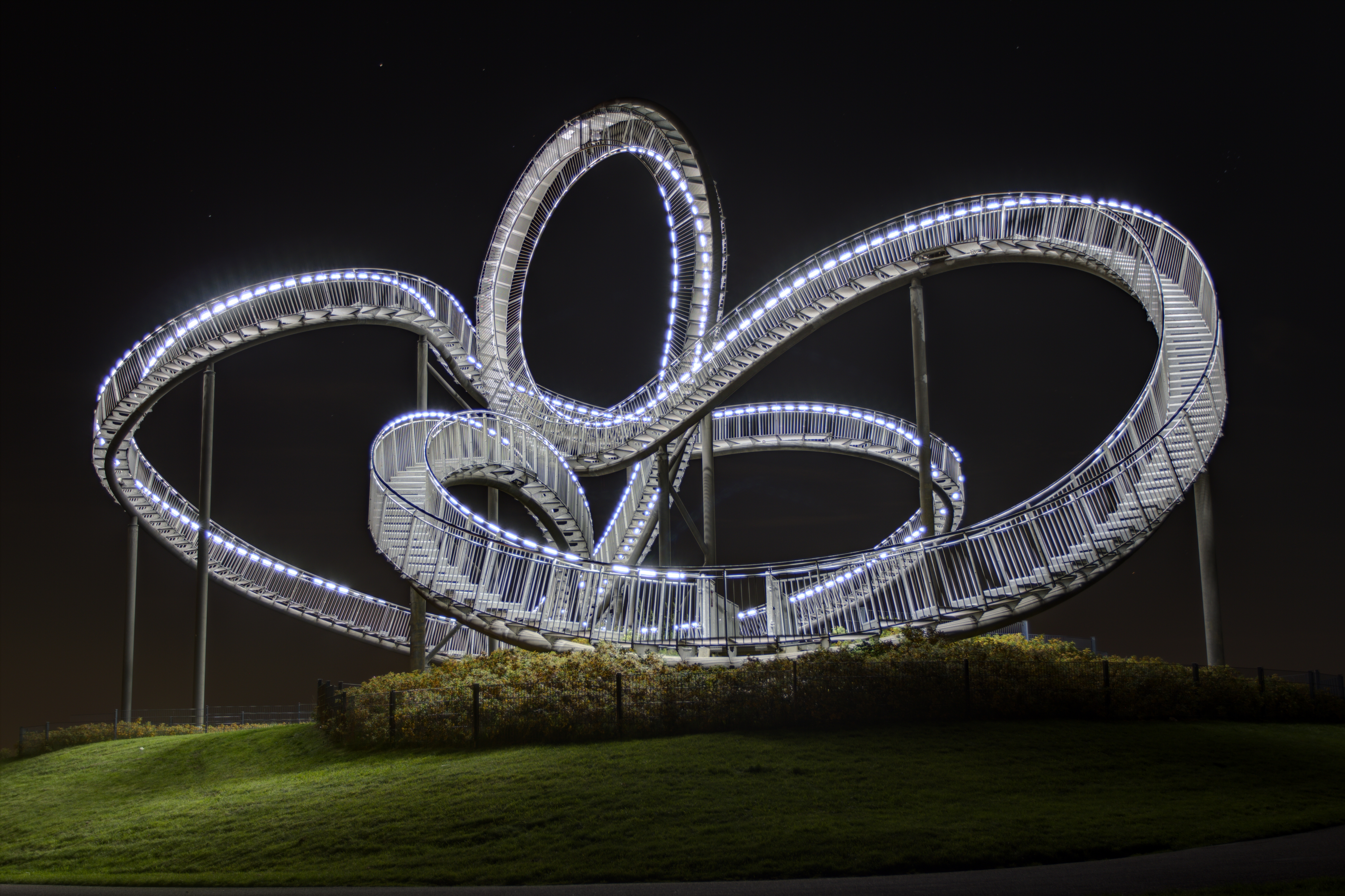 Tiger and Turtle ist eine Landmarke der Route Industriekultur